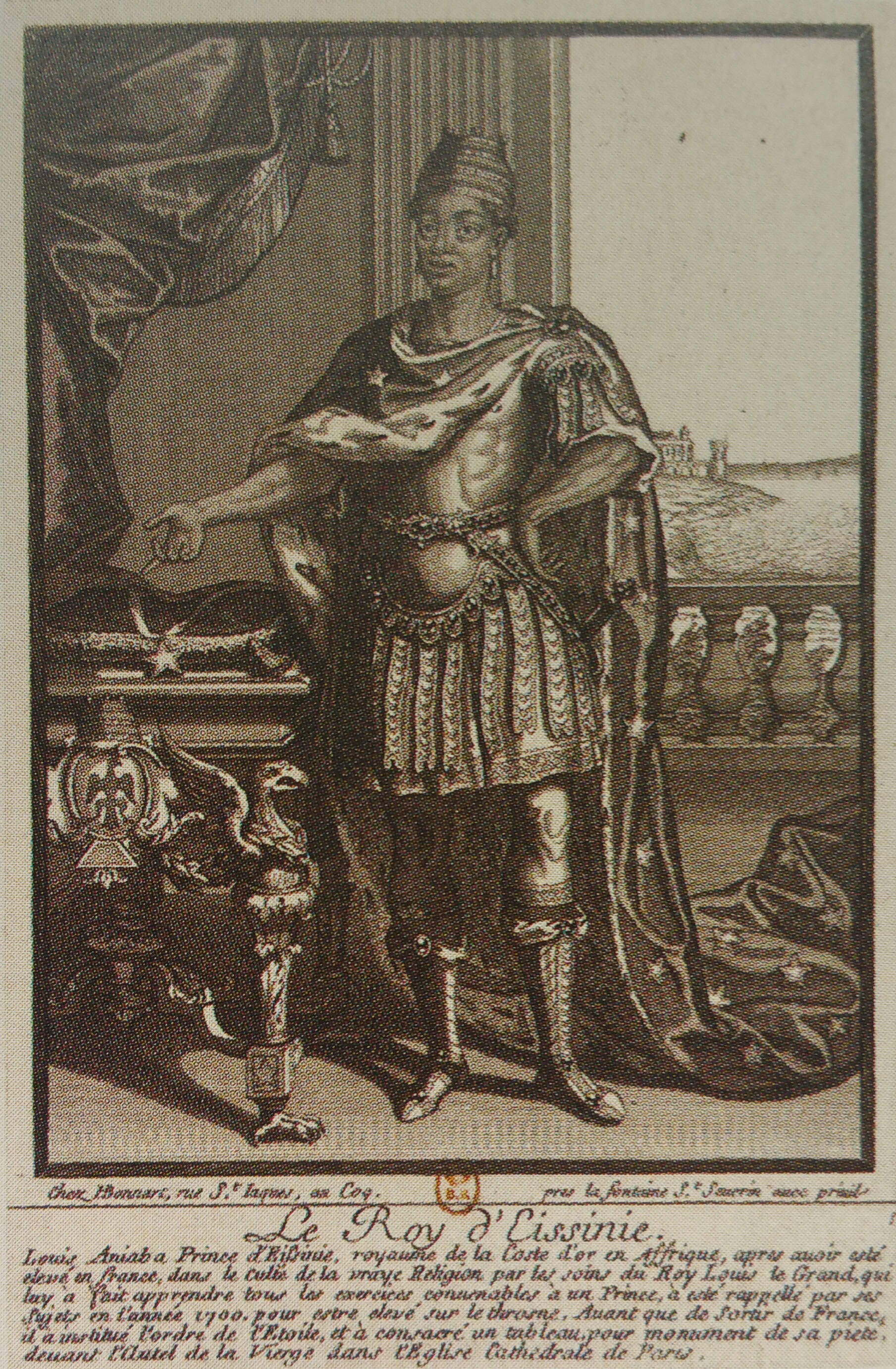 Gravure d' représentant d'Aniaba, un prince d'Assinie (région du sud de l'actuelle côte d'Ivoire) qui vécut 10 ans en France sous Louis XIV.